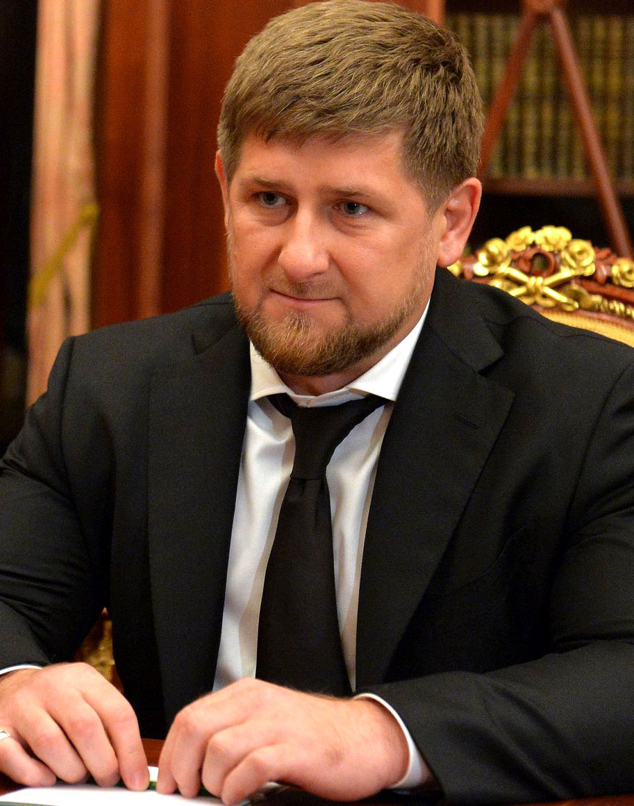 Глава Чеченской Республики Рамзан Ахматович Кадыров